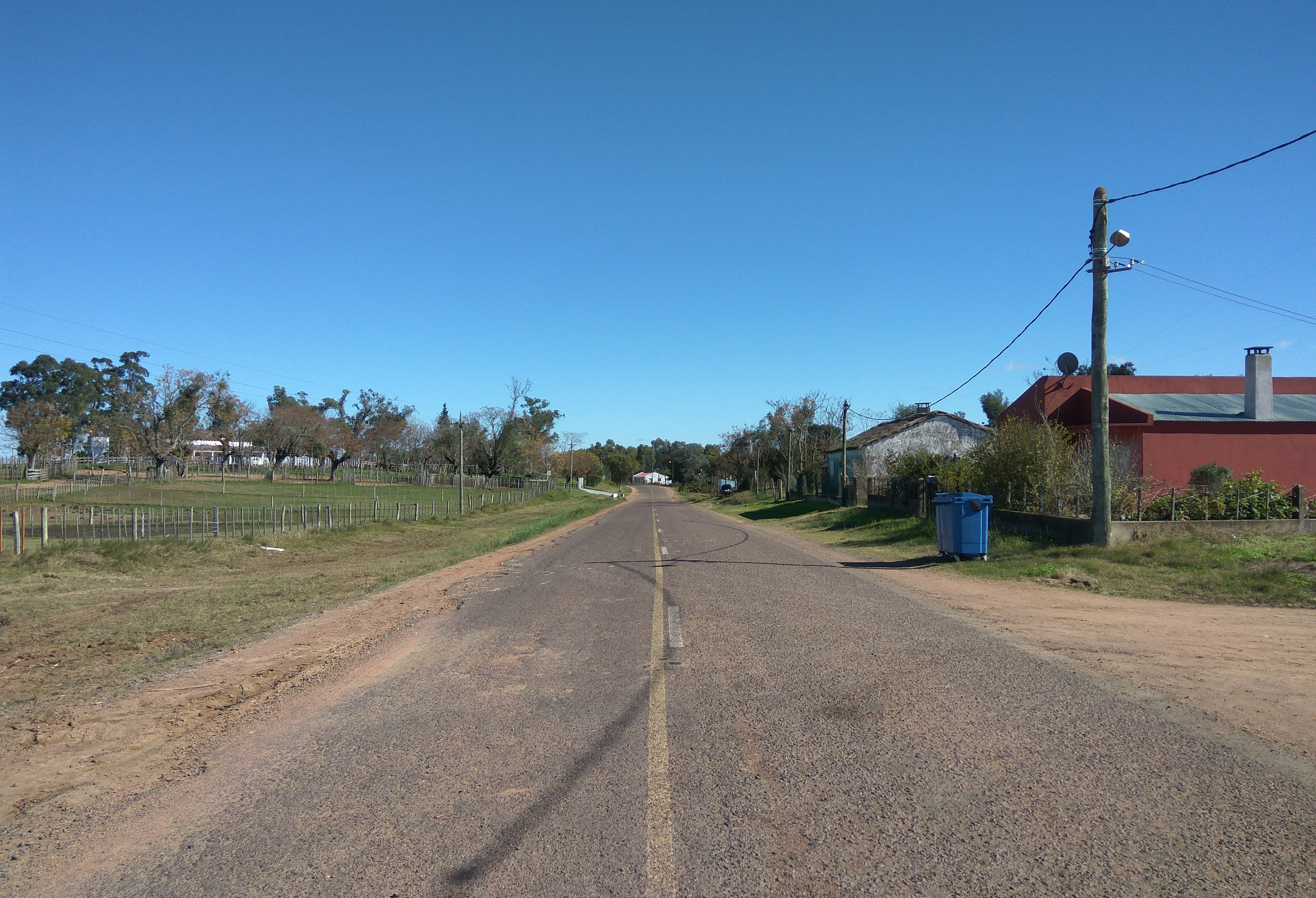 Ruta 44 en la localidad de Pueblo de Arriba, departamento de Tacuarembó, Uruguay.